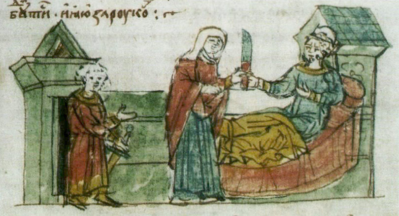 Беларуская (тарашкевіца): Мініятура Радзівілаўскага летапісу: Помсьцячы за спалены Полацак і забітых бацькоў Рагнеда спрабуе забіць свайго мужа Ўладзімера